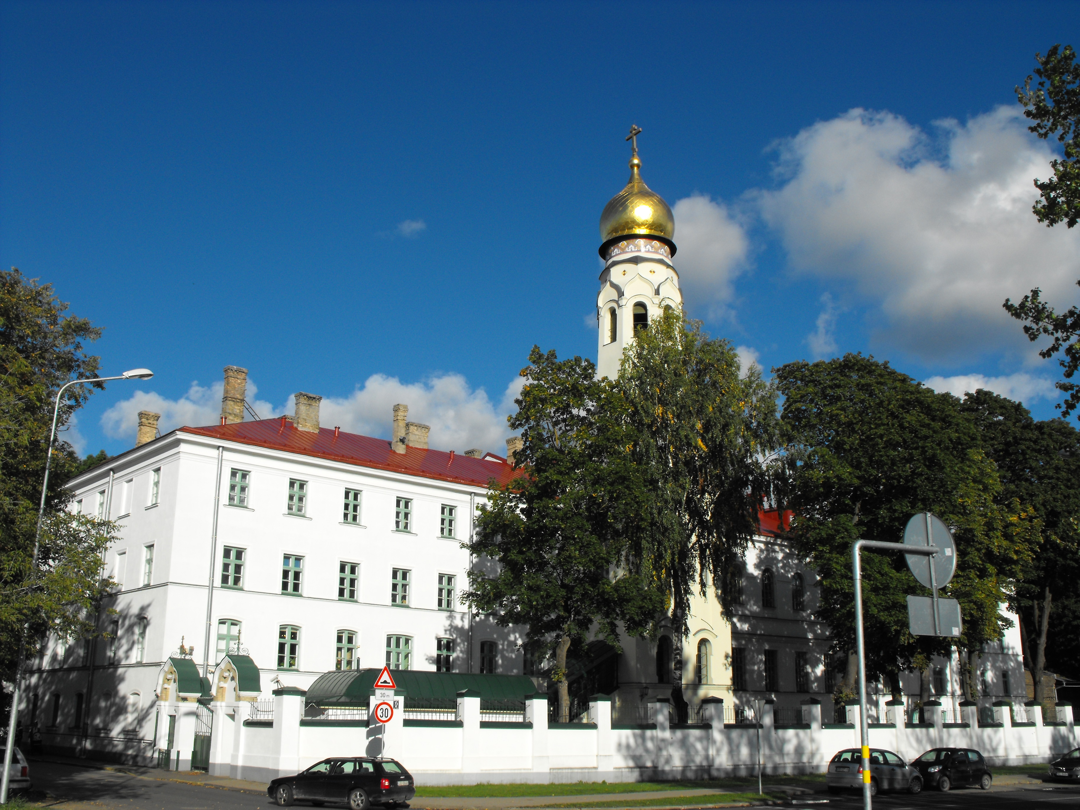 Grebenščikova vecticībnieku kopienas lūgšanu nama ar klosteri apbūve, Rīga, Krasta iela 73